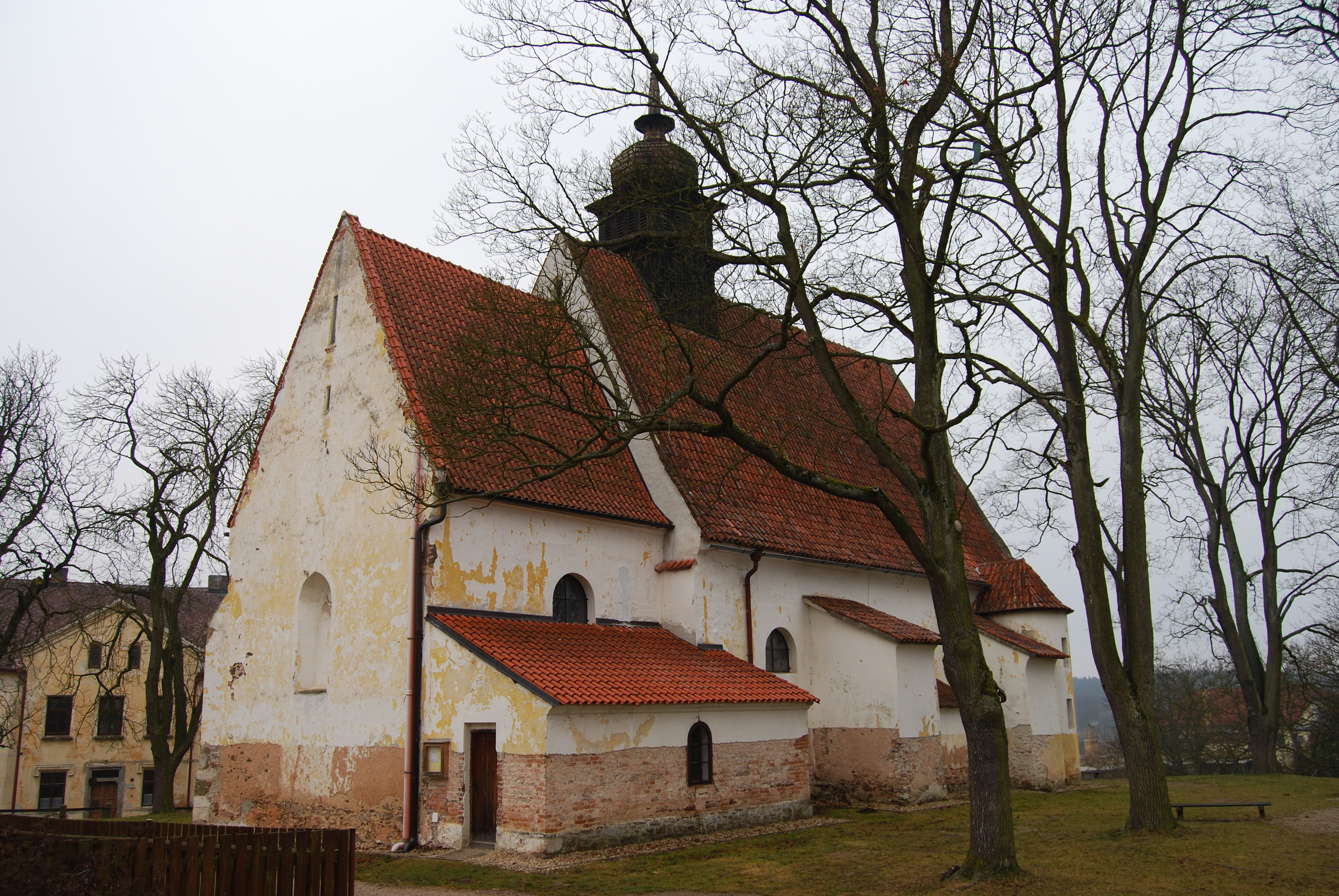 Kostel Všech svatých. Sudoměřice u Bechyně v okrese Tábor, kraj Jihočeský. Česká republika. - Google Maps - Google Earth